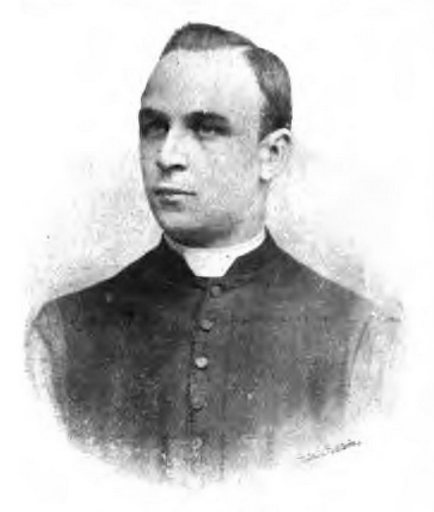 Hornjoserbsce: hsb:Jakub Šewčik (1867–1935); serbski farar, kulturny stawiznar a basnik.